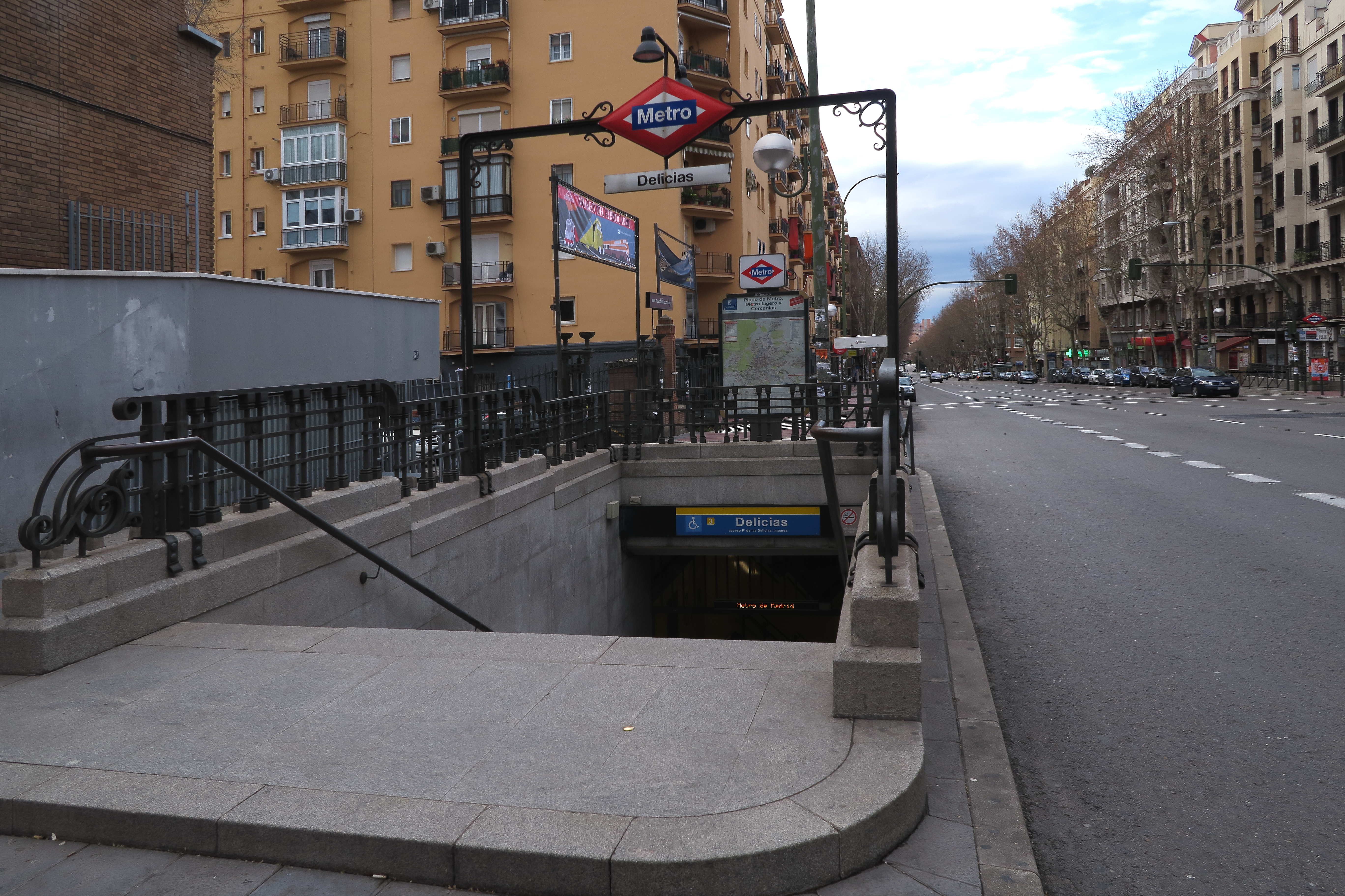 Estación de Delicias (Metro de Madrid)